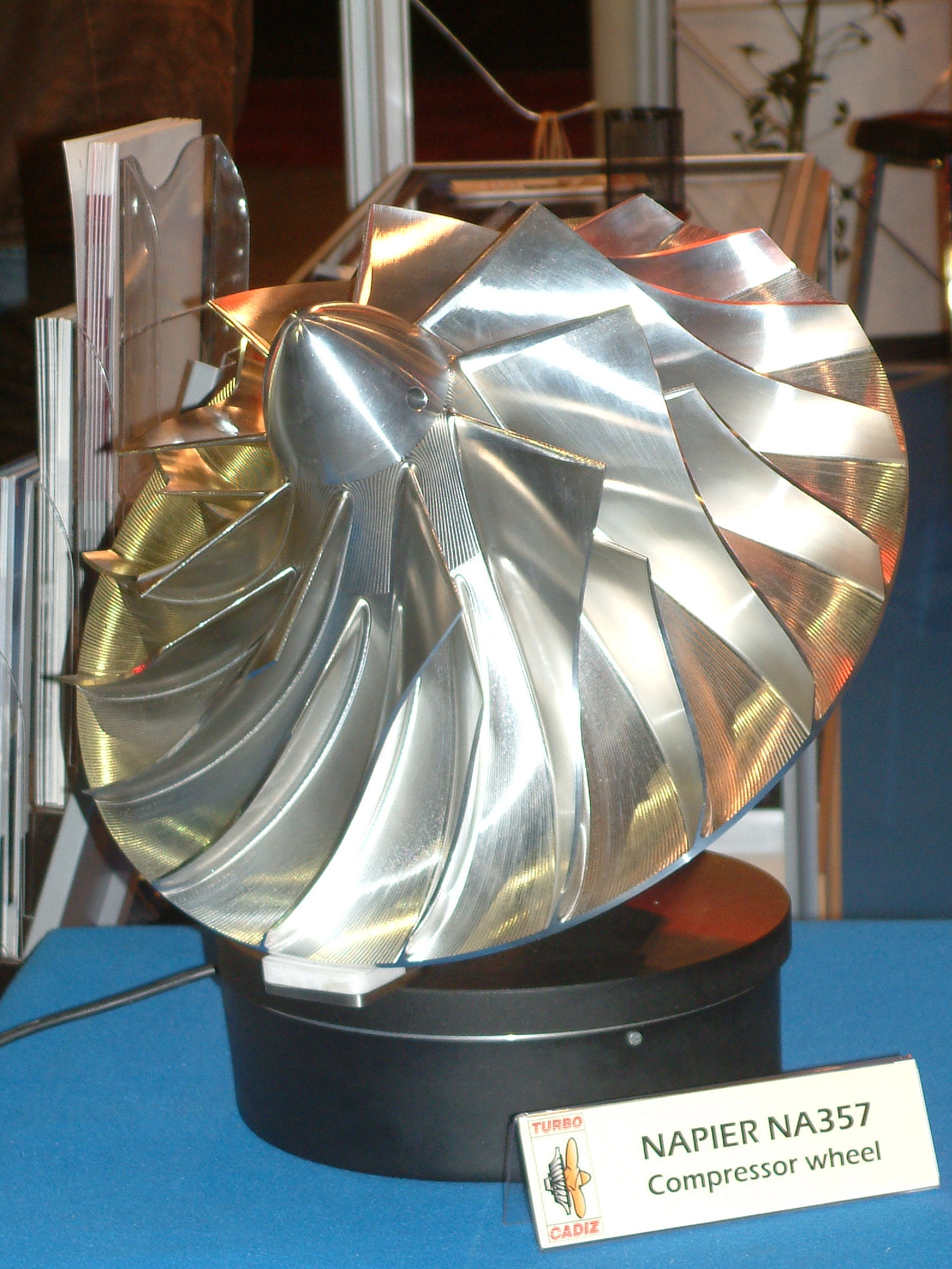 Europort 2009